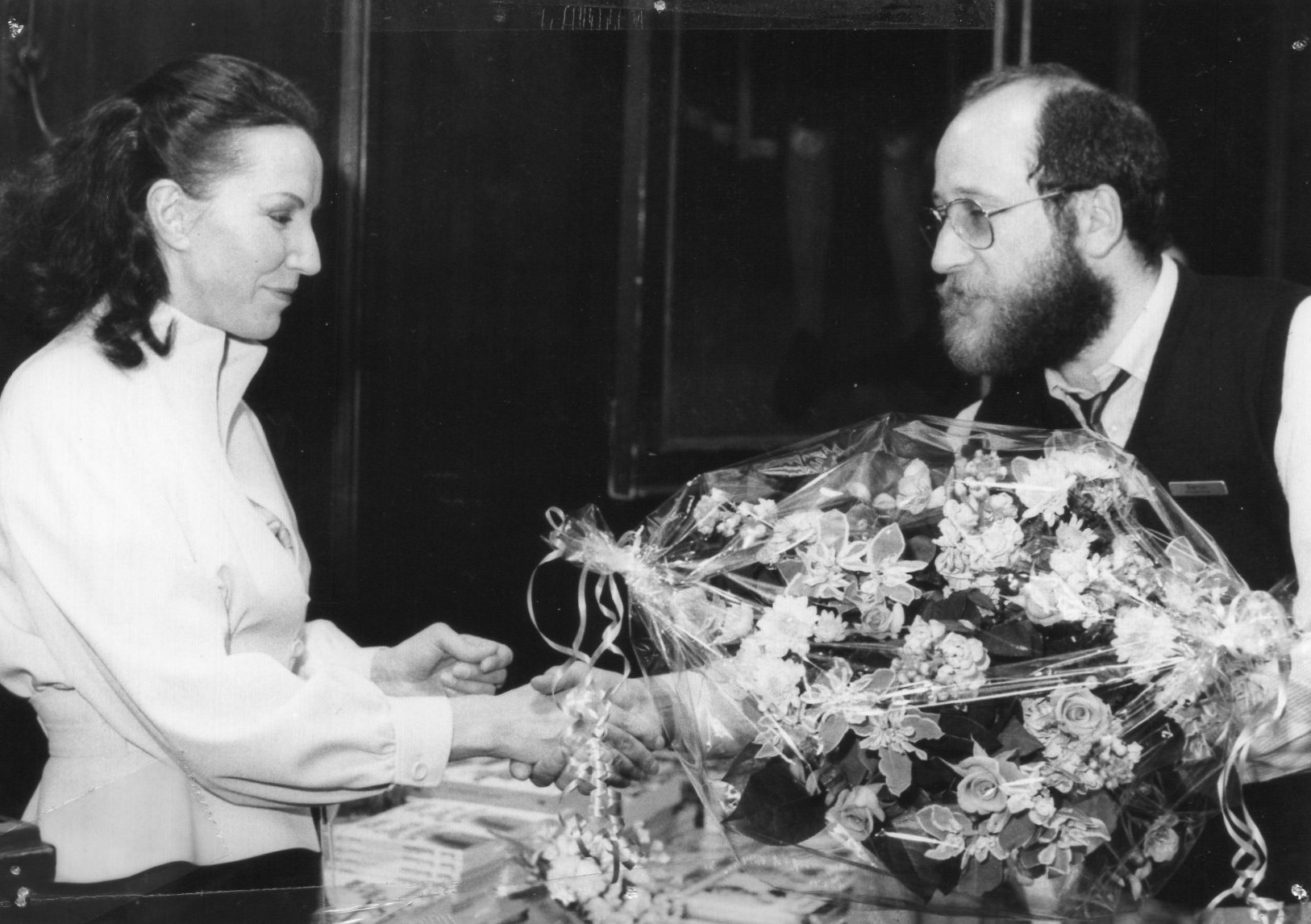 Bernhard M. Baron begrüßt die Schweizer Schriftstellerin Sandra Parettti (= Dr. Irmgard Schneeberger) am 4. Mai 1985 im Alten Rathaus in Weiden anlässlich der 1. Weidener Literatur-tage.